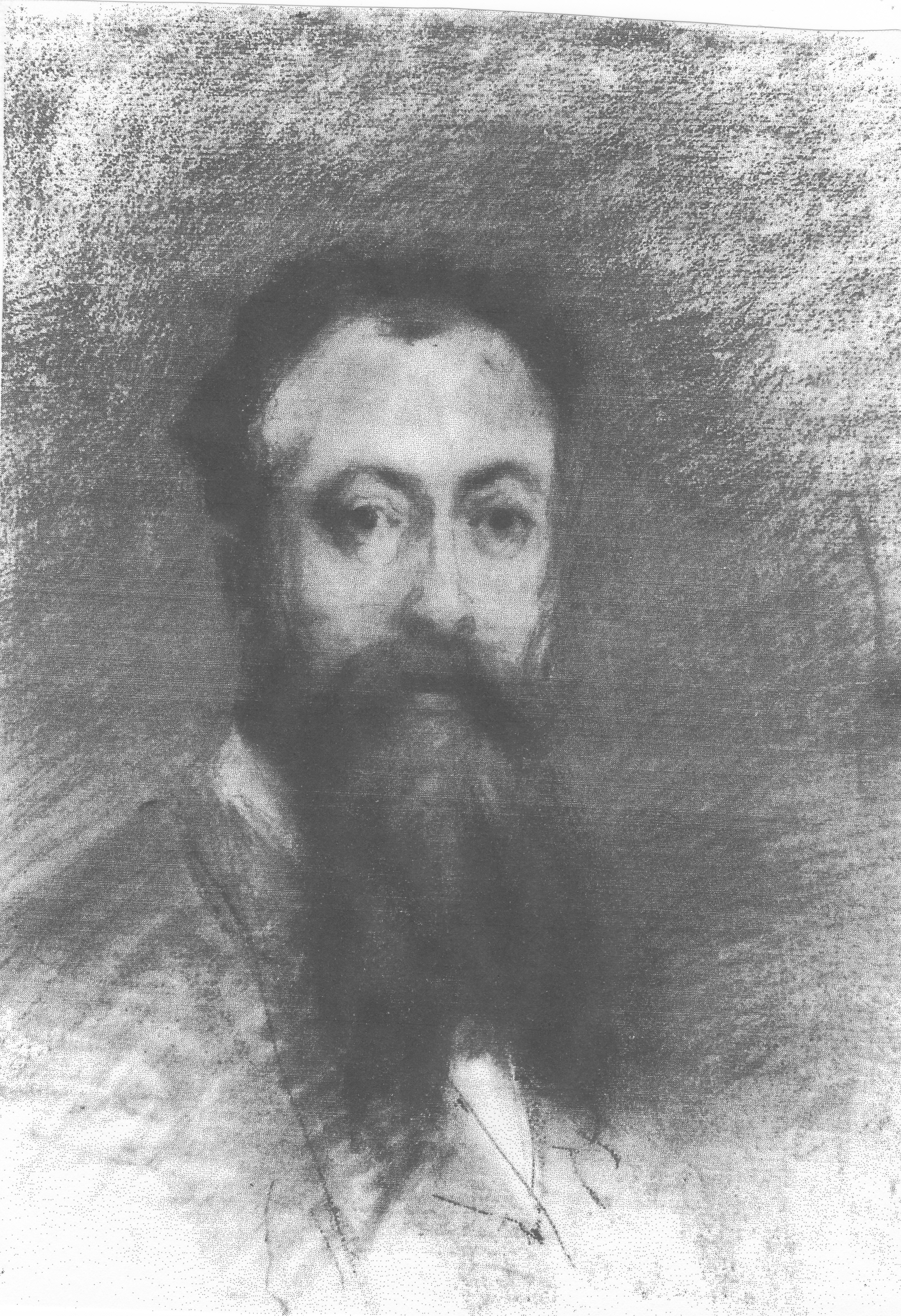 Immagine dell'autoritratto di Pompeo Mariani del 1908